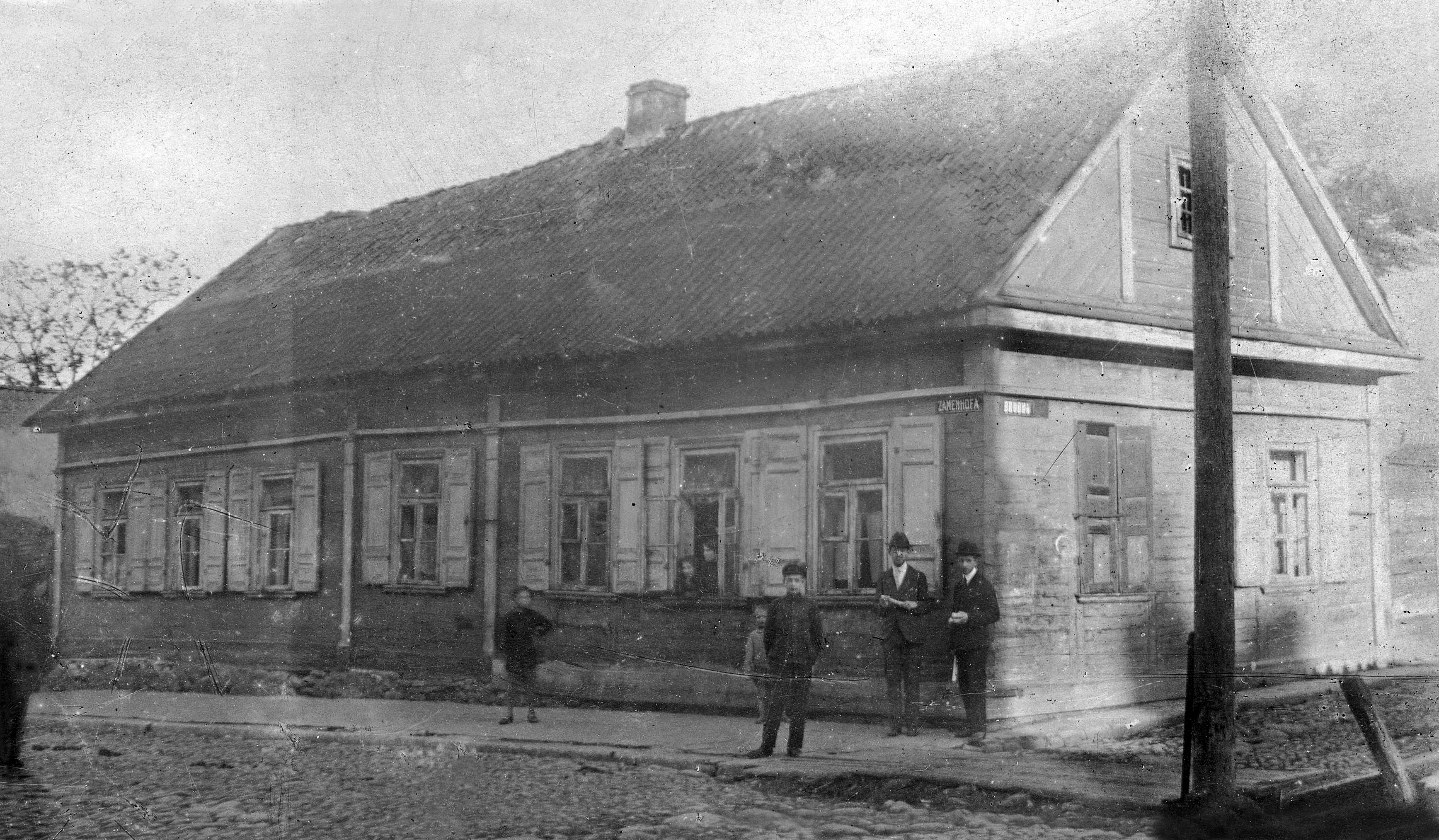 Dom urodzin Ludwika Zamenhofa. Zdjęcie wykonano po 1919 (przemianowanie ul. Zielonej na Zamenhofa) a przed 1927 r. (powieszenie marmurowej tablicy). Na rogu Zamenhofa i Brudnej stoją Jakub Szapiro i Filip Kurjański